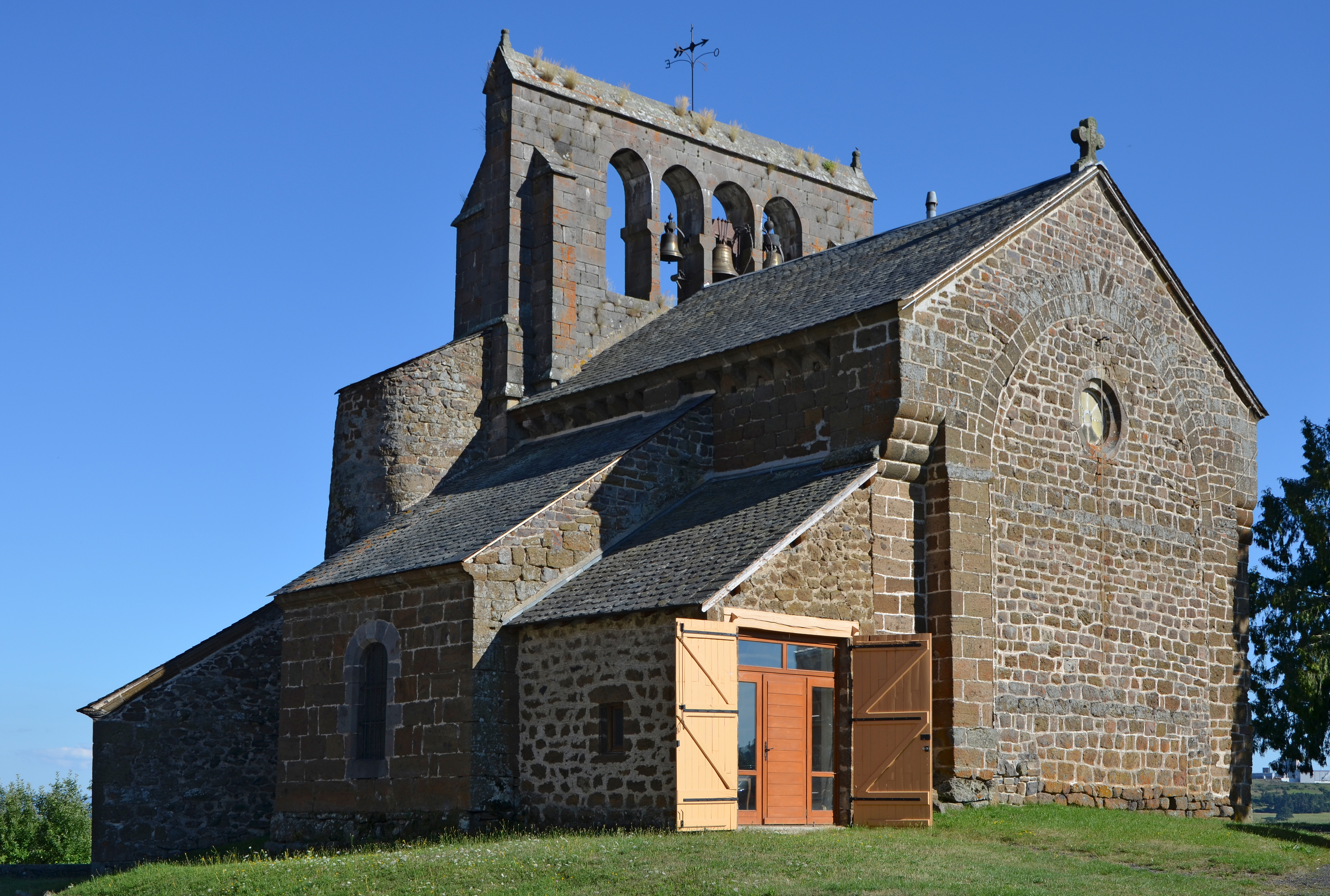 Eglise St-Cirgues a Andelat, Cantal, France .